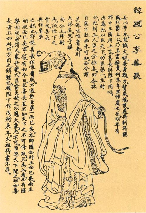 李善长，明朝军事將領。